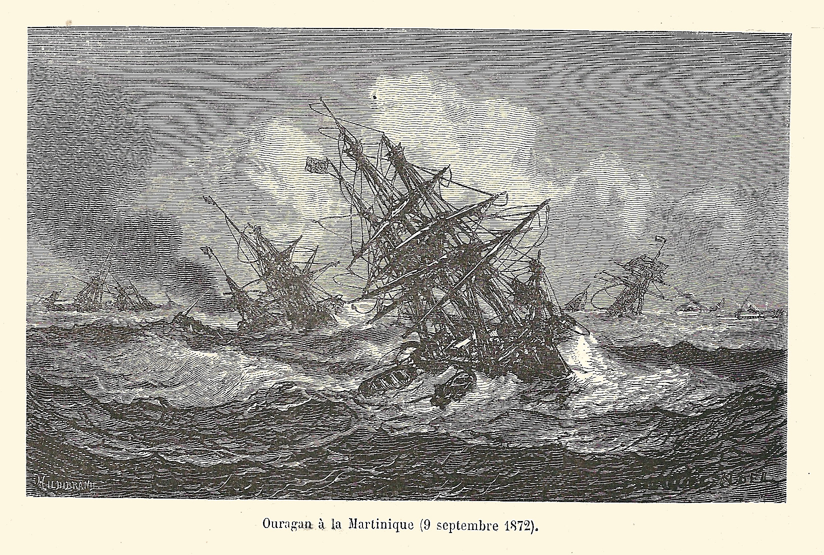 Gravure de Jules Noël tirée de : Zurcher & Margollé, Les Naufrages célèbres, Paris : Hachette, 3e édition, 1877 -- Naufrages de navires lors de l'ouragan du 9 septembre 1872 sur la Martinique.